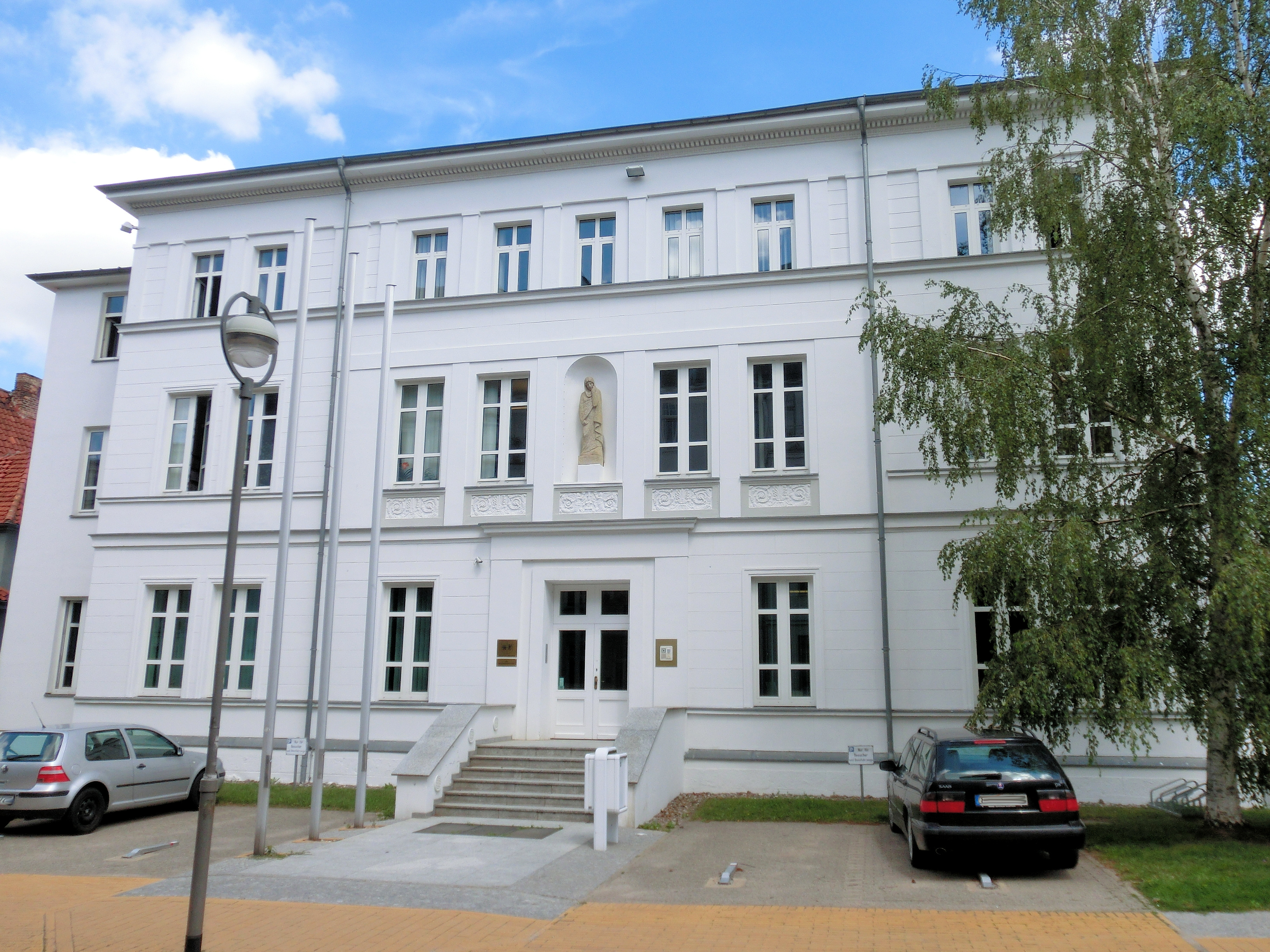 Rostock Patriotischer Weg 120a (Baudenkmal), Sitz der Generalstaatsanwaltschaft Rostock